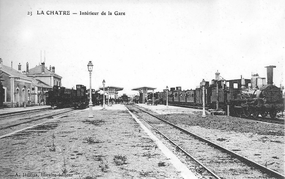 Intérieur de la gare avec les voies et quais ainsi que des trains.